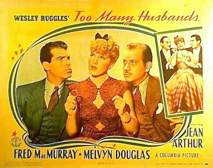 Poster "Too Many Husbands"